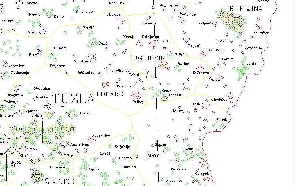 Демографическая карта Тузлы. Зелёный - боснийцы, красный - сербы, синий - хорваты, жёлтый - югославы, розовый - остальные